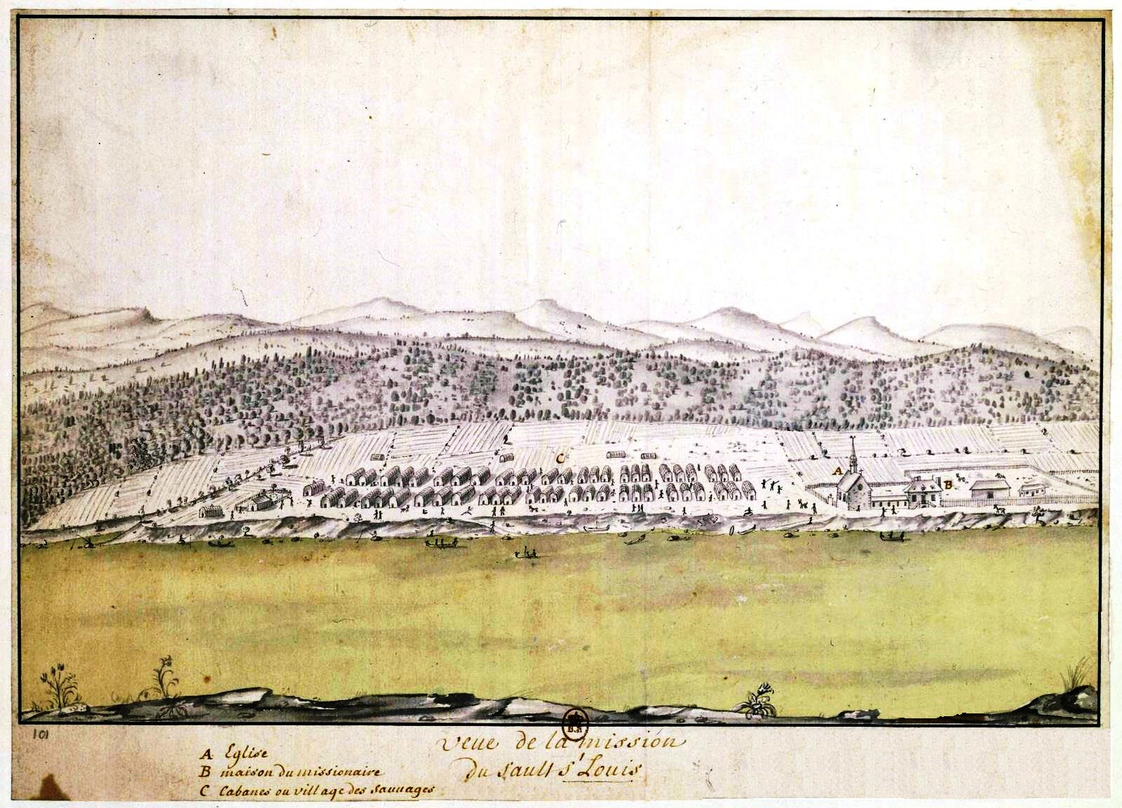 Veue de la mission du Sault St Louis